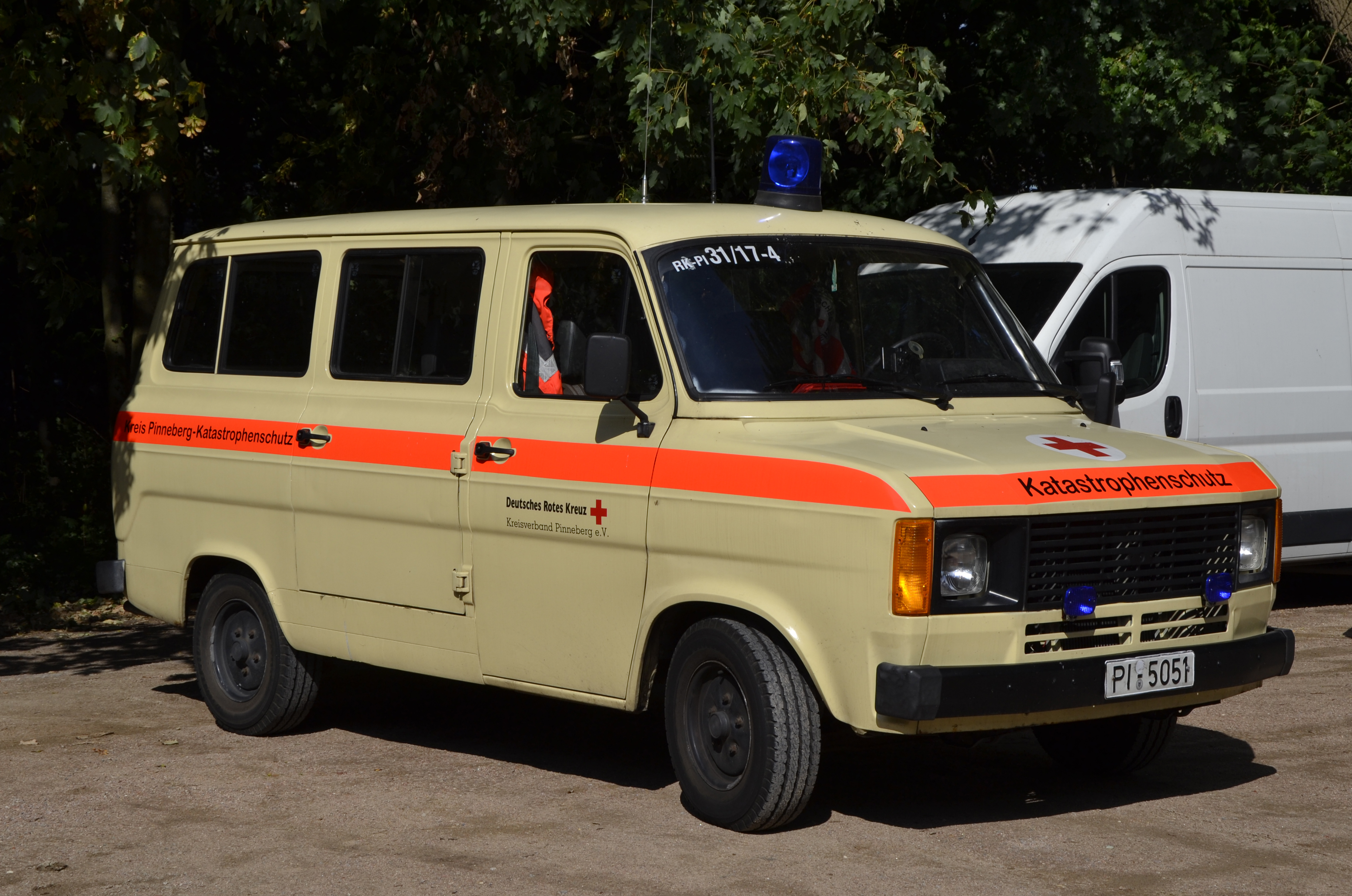 Ford Transit Sanitätsgruppen-Kraftwagen/Mannschaftstransportwagen des DRK Ortsverbandes Rellingen beim Rock 'N' Rose Festival 2014